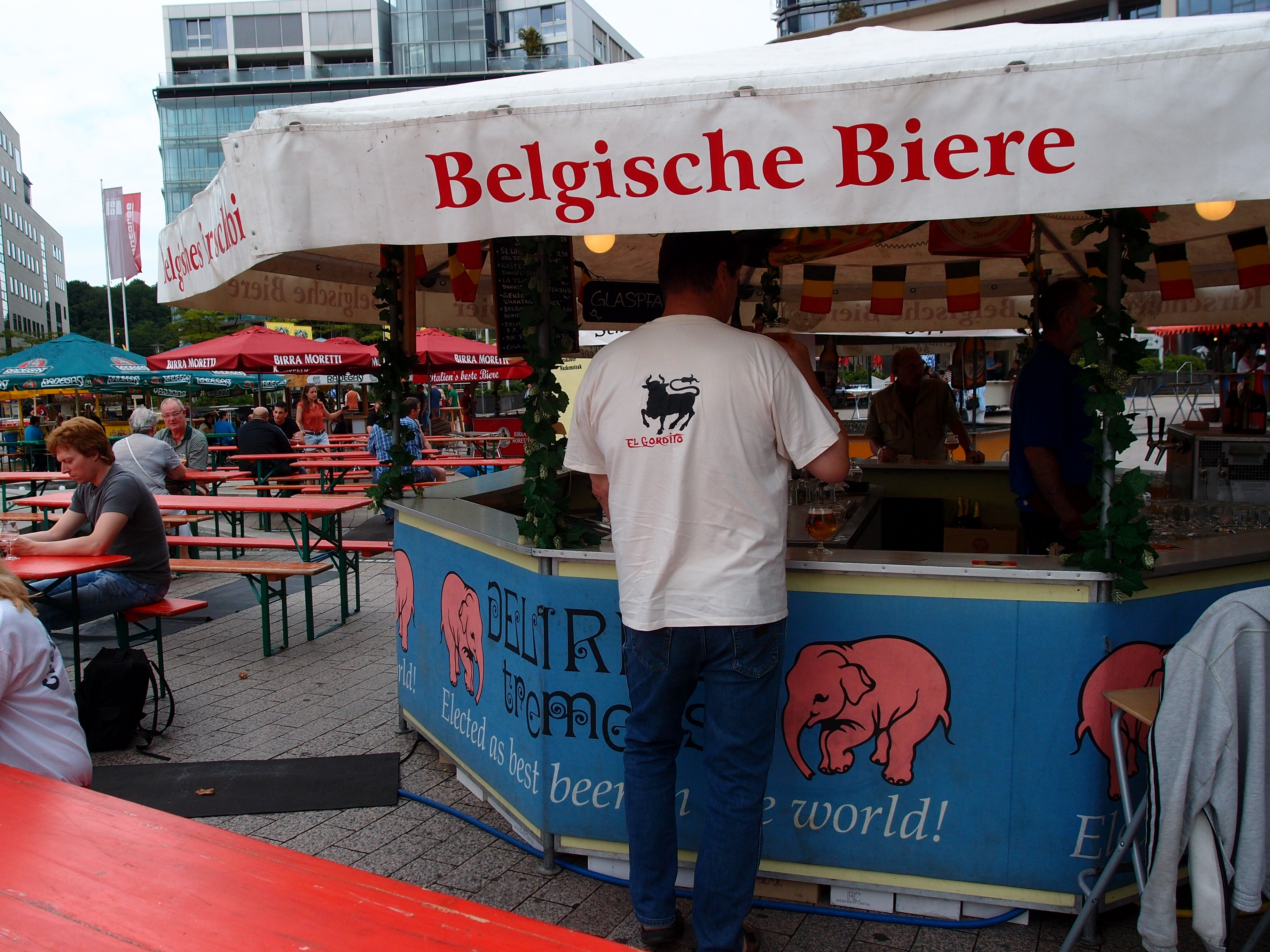 Kölner Bierbörse (August 2012), Mediapark (Belgische Biere) Datum: 24.08.2012 Urheber: M. Pfeiffer alias Benutzer:Gordito1869 (Selbstauslöser) Quelle: privates Fotoarchiv des Urhebers